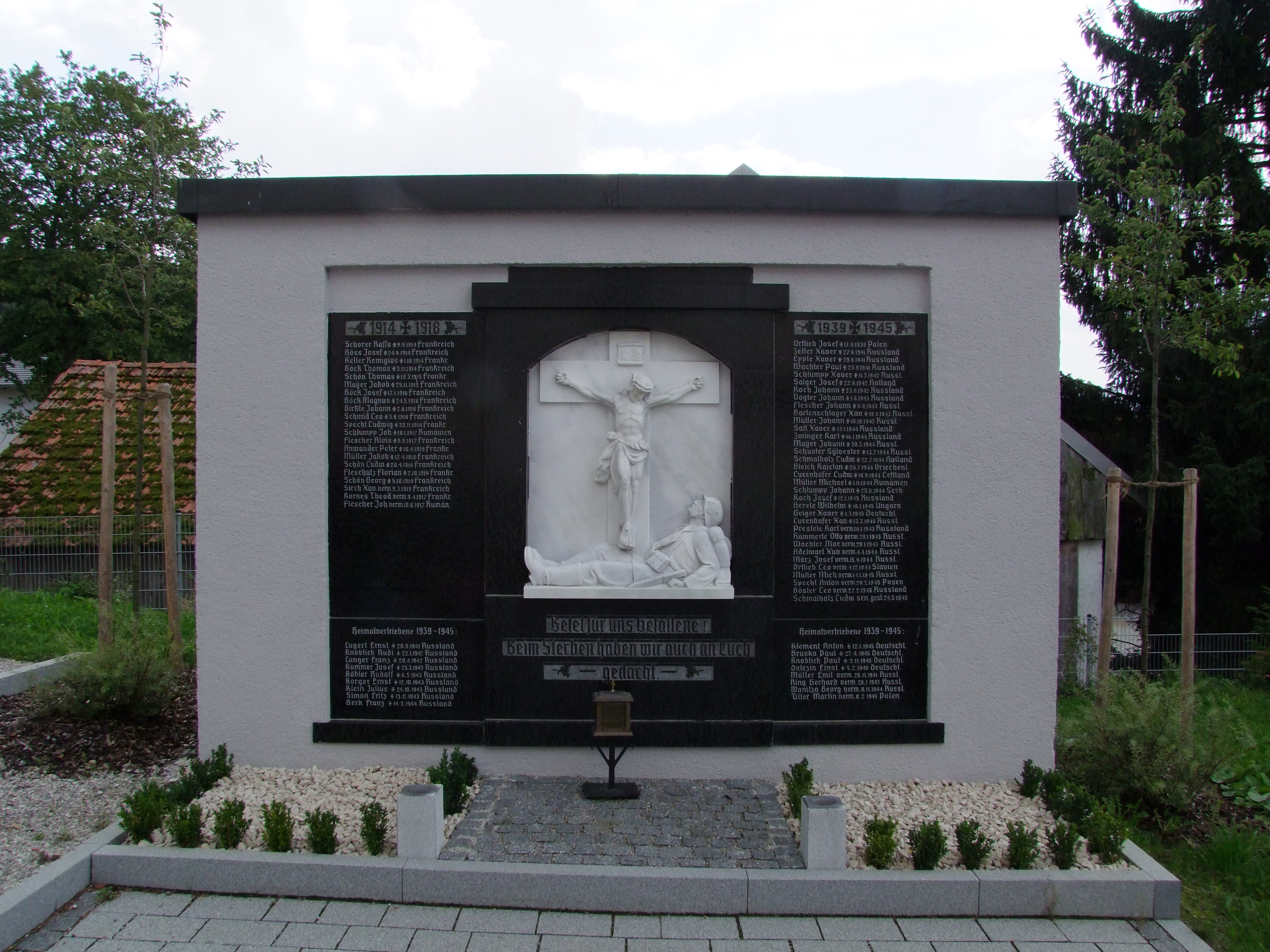 St. Jakobus der Ältere im oberschwäbischen Mindelau, einem Ortsteil der Stadt Mindelheim in Bayern/Schwaben